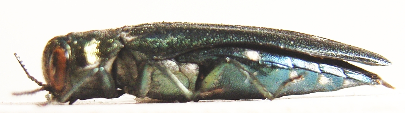 Side of Agrilus biguttatus